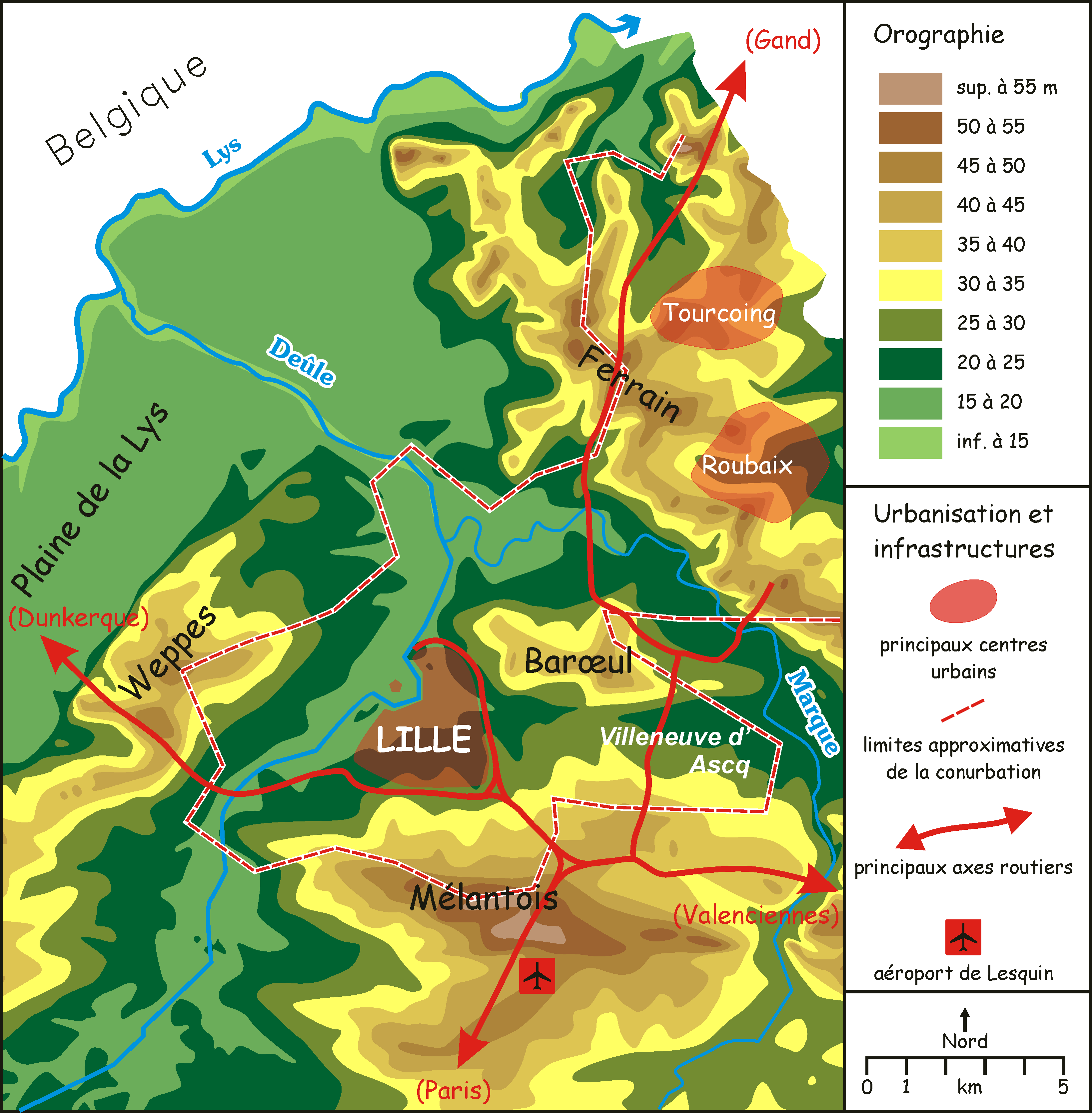 la ville de Lille dans son cadre géographique, carte réalisée en décembre 2005 par Laurent Deschodt d'après les cartes IGN 1/50000 Contents 1 Licensing 2 Licensing 3 Original upload log 4 Original upload log Licensing Catégorie:Cartes et plans de Lille